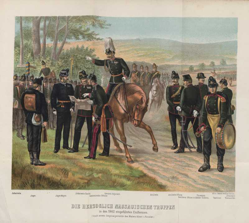 Darstellung von Truppen des Herzogtum Nassau in ab 1862 eingeführten der Uniform